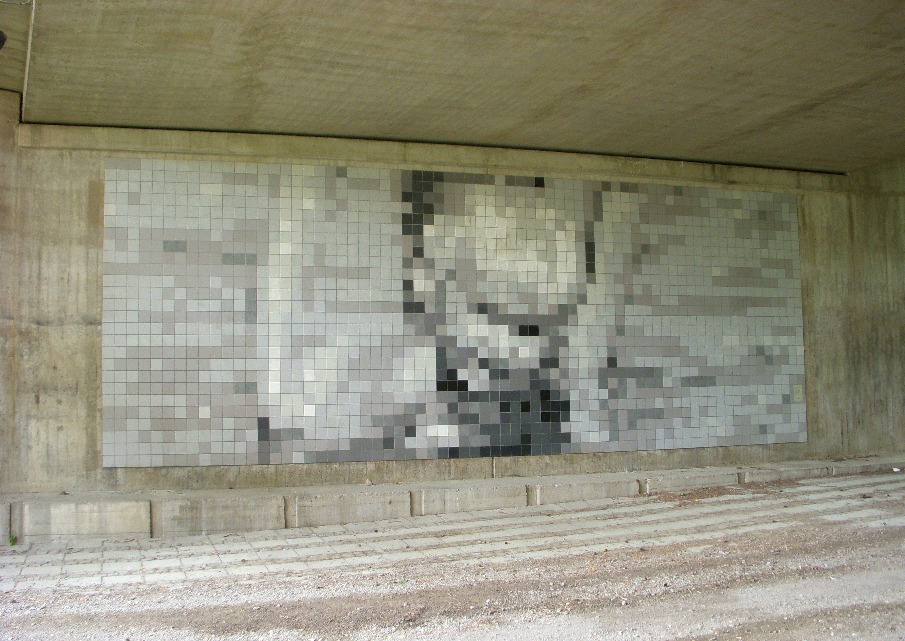 "Grått i grått" konstverk av Maria Ängquist-Klyvare i Grynkvarnsparken, Johanneshov